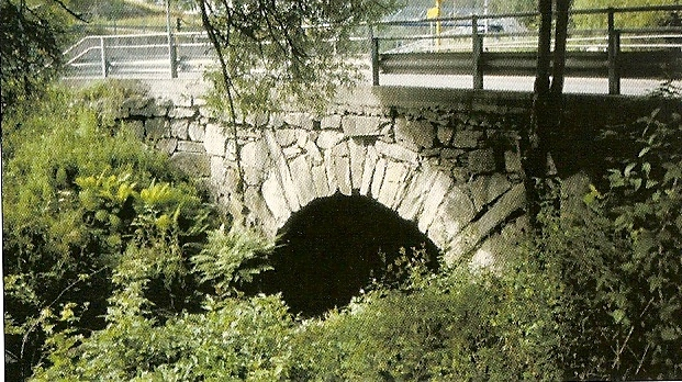 Steinhvelvbru over Ljanselva ved Ljabru i Oslo